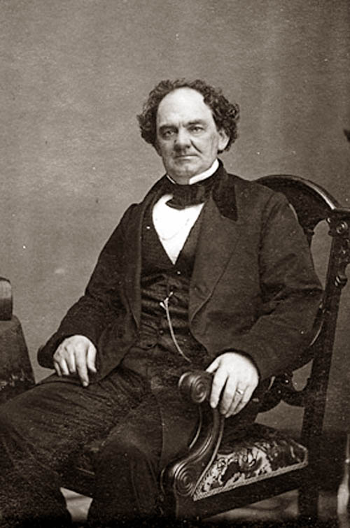 Phineas Taylor Barnum (1810 - 1891), US-american cirus show man / US-amerikanischer Zirkuspionier und Schausteller